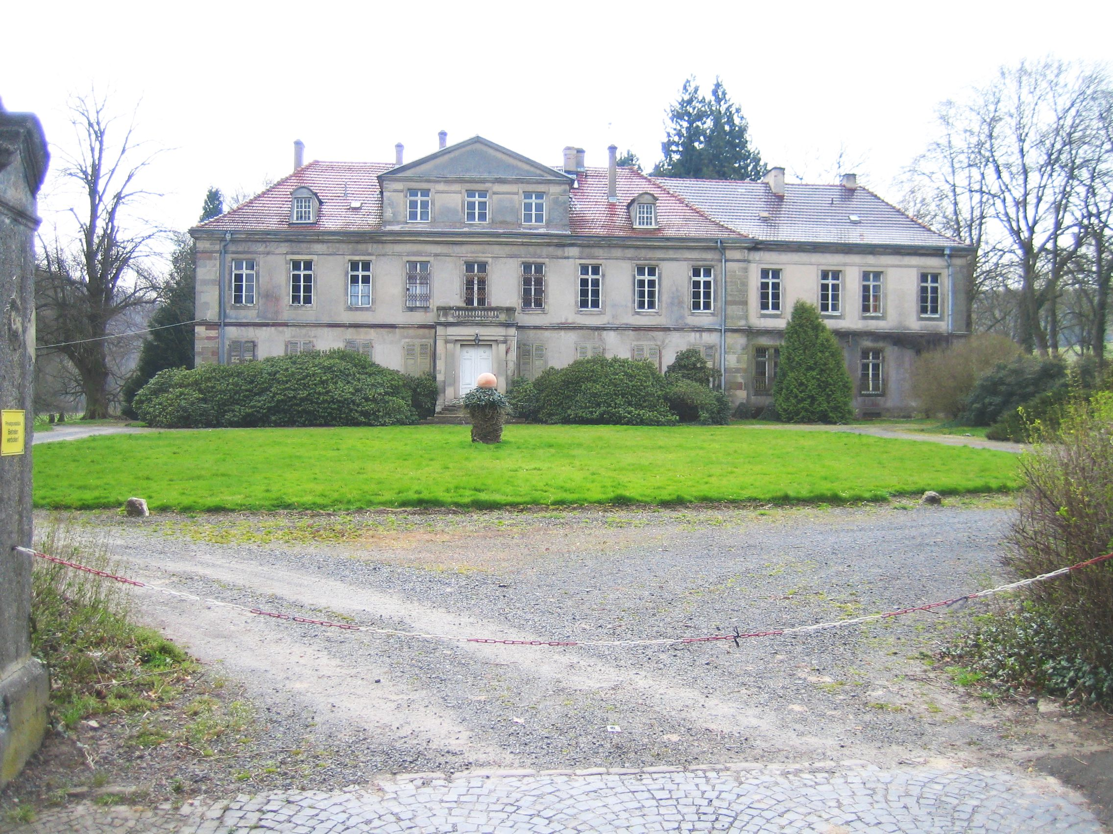 Schloss Laar im Warmetal